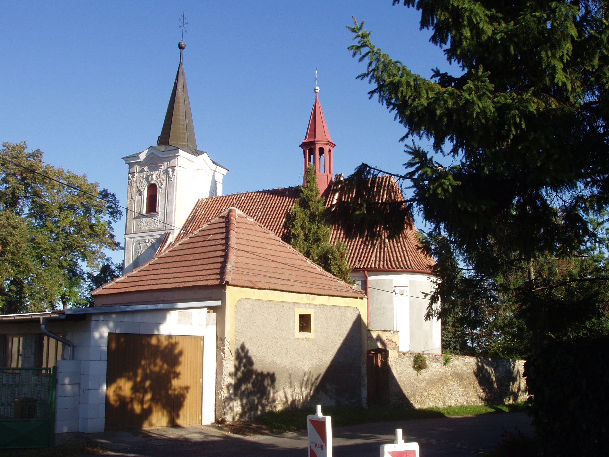 Kostel sv. Petra a Pavla (Nebovidy), v centru obce, Nebovidy